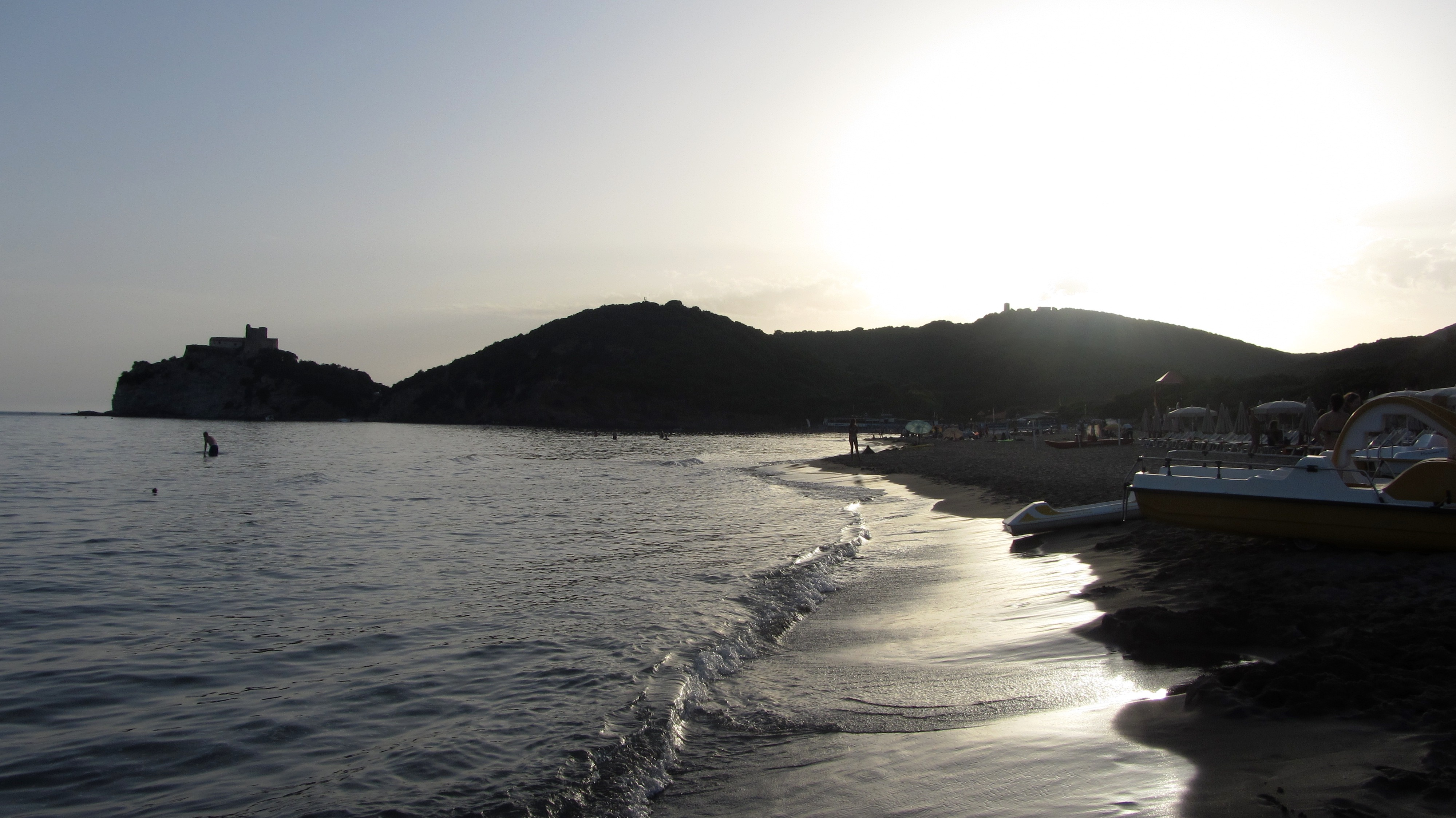 Rocchette - Castiglione della Pescaia (GR). Tramonto lungo la spiaggia